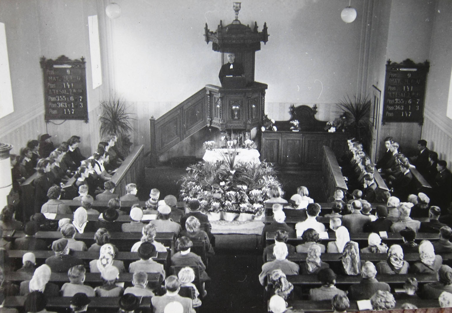 Konfirmace ve starém kostele